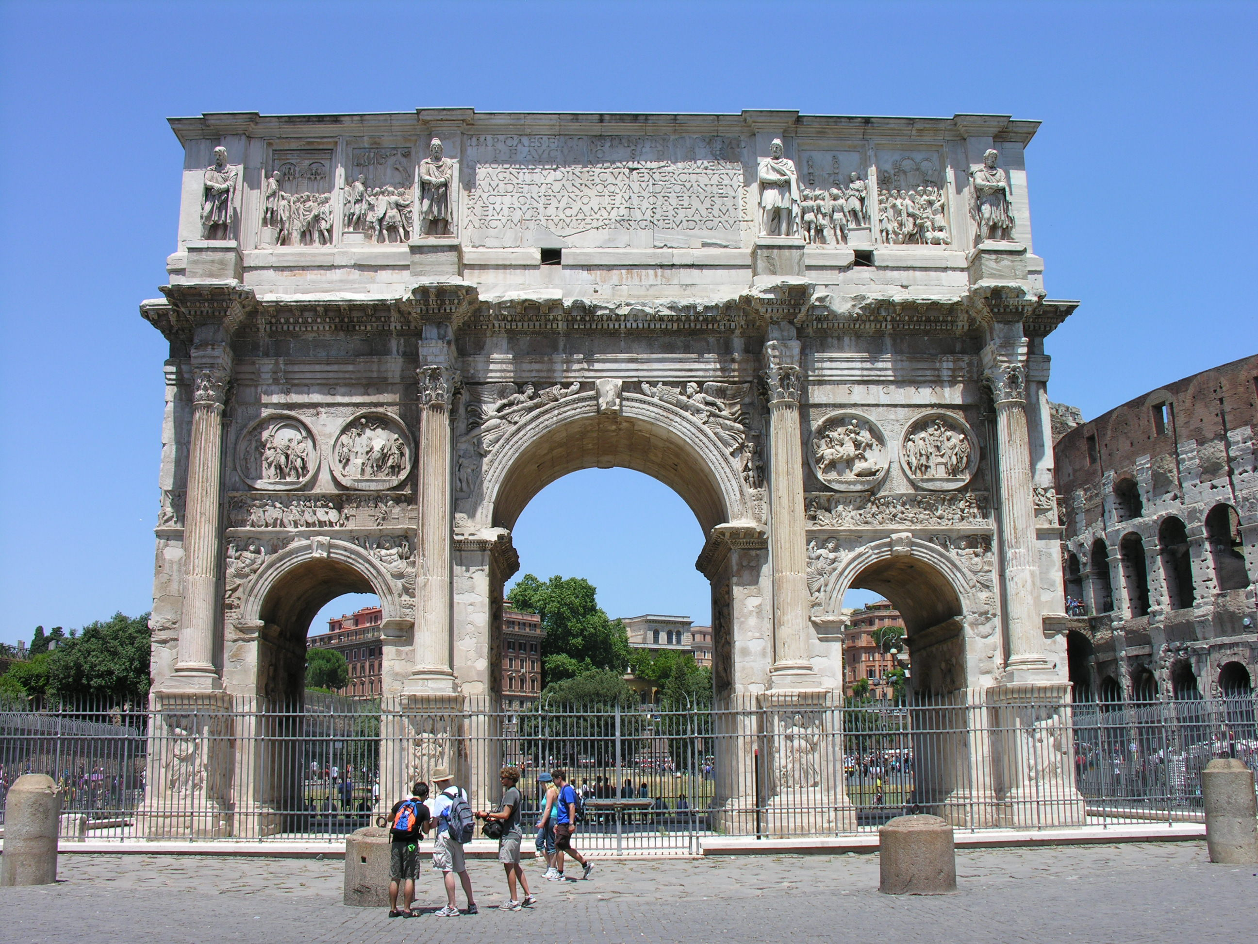 Arco